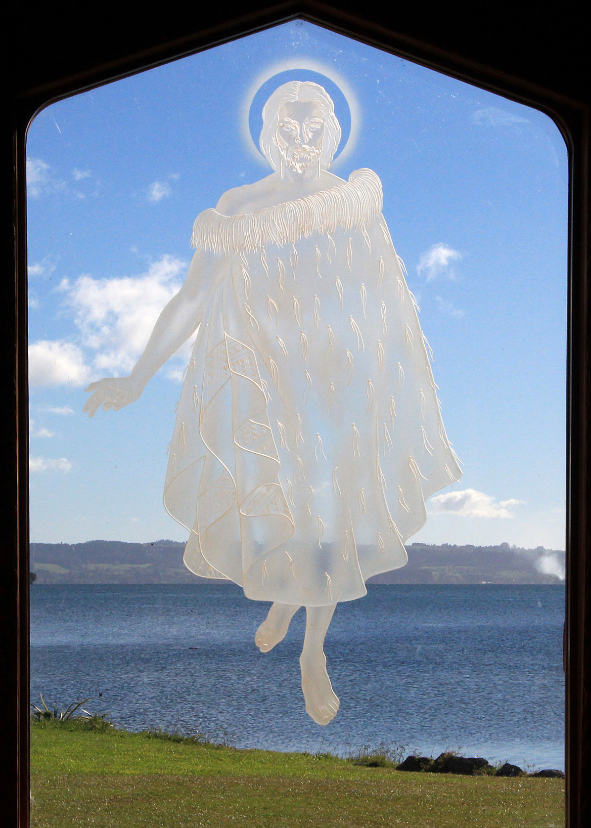 Jesus als Maorihäuptling - Fenster in der Kirche St. Faith’s Rotorua